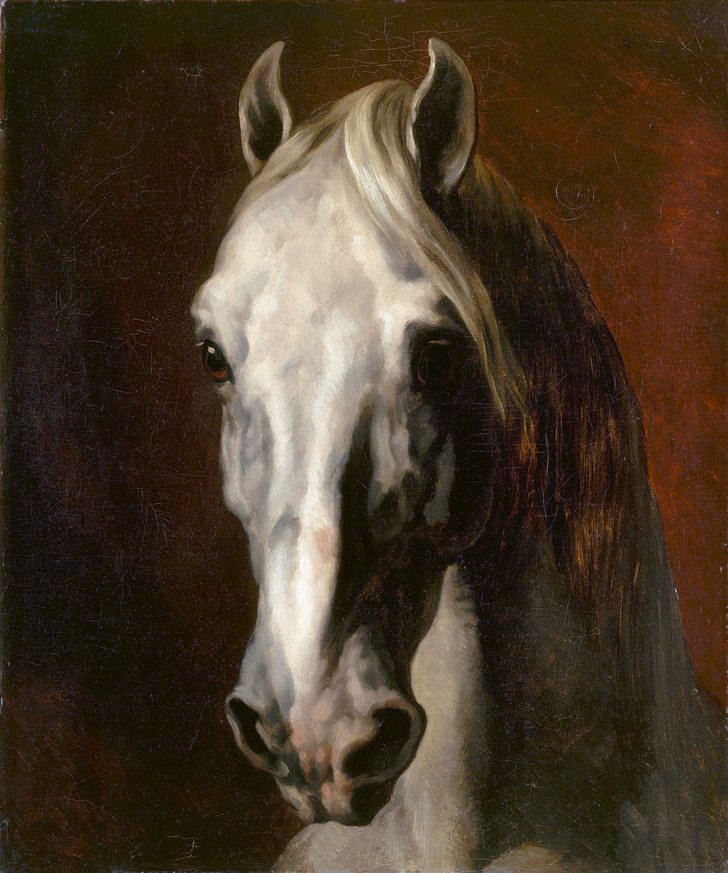 Tete de cheval blanc